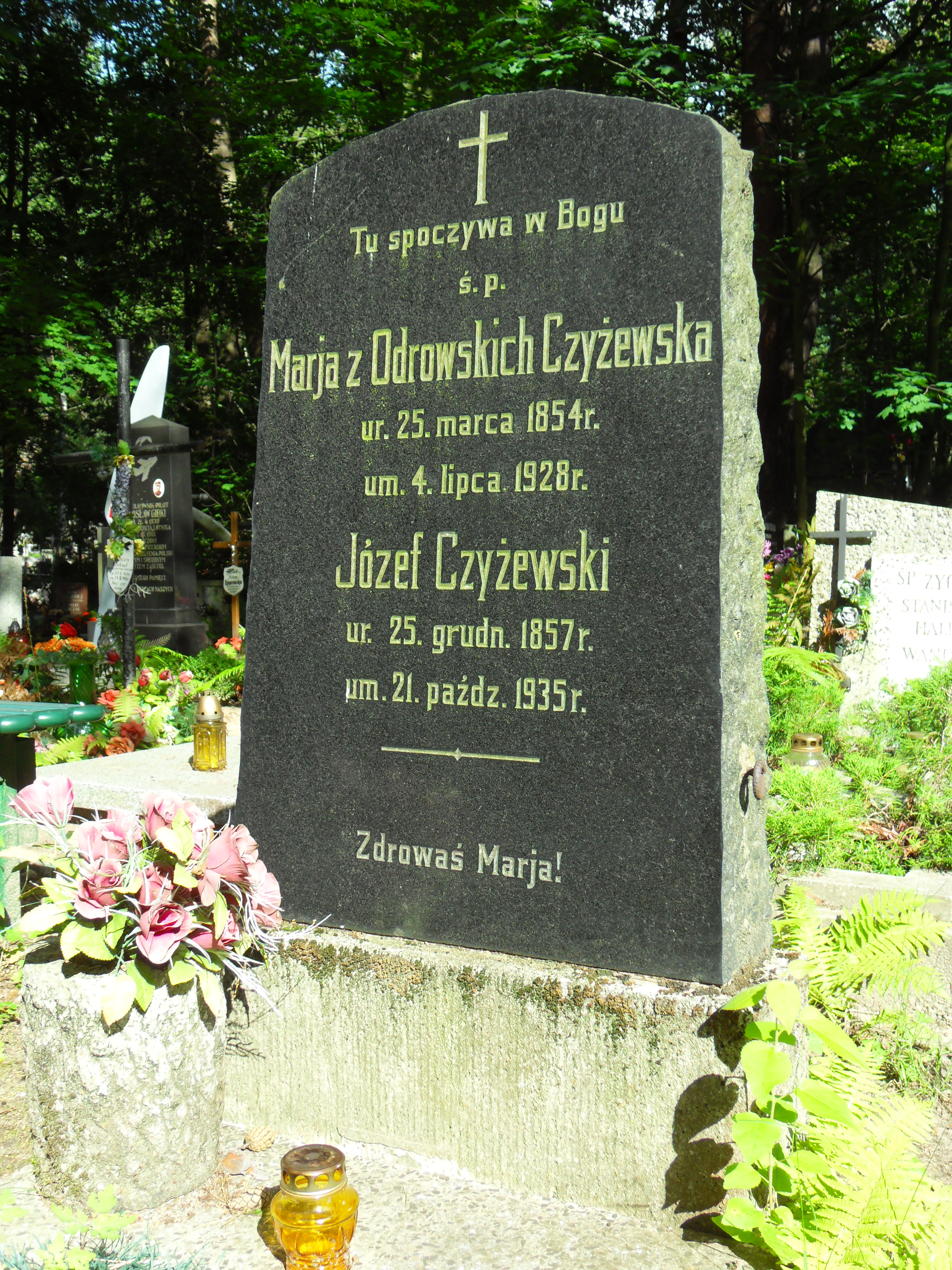 Gdańsk Wrzeszcz Górny. Cmentarz Srebrzysko, grób Marja z Odrowskich Czyżewska i Józef Czyżewski.